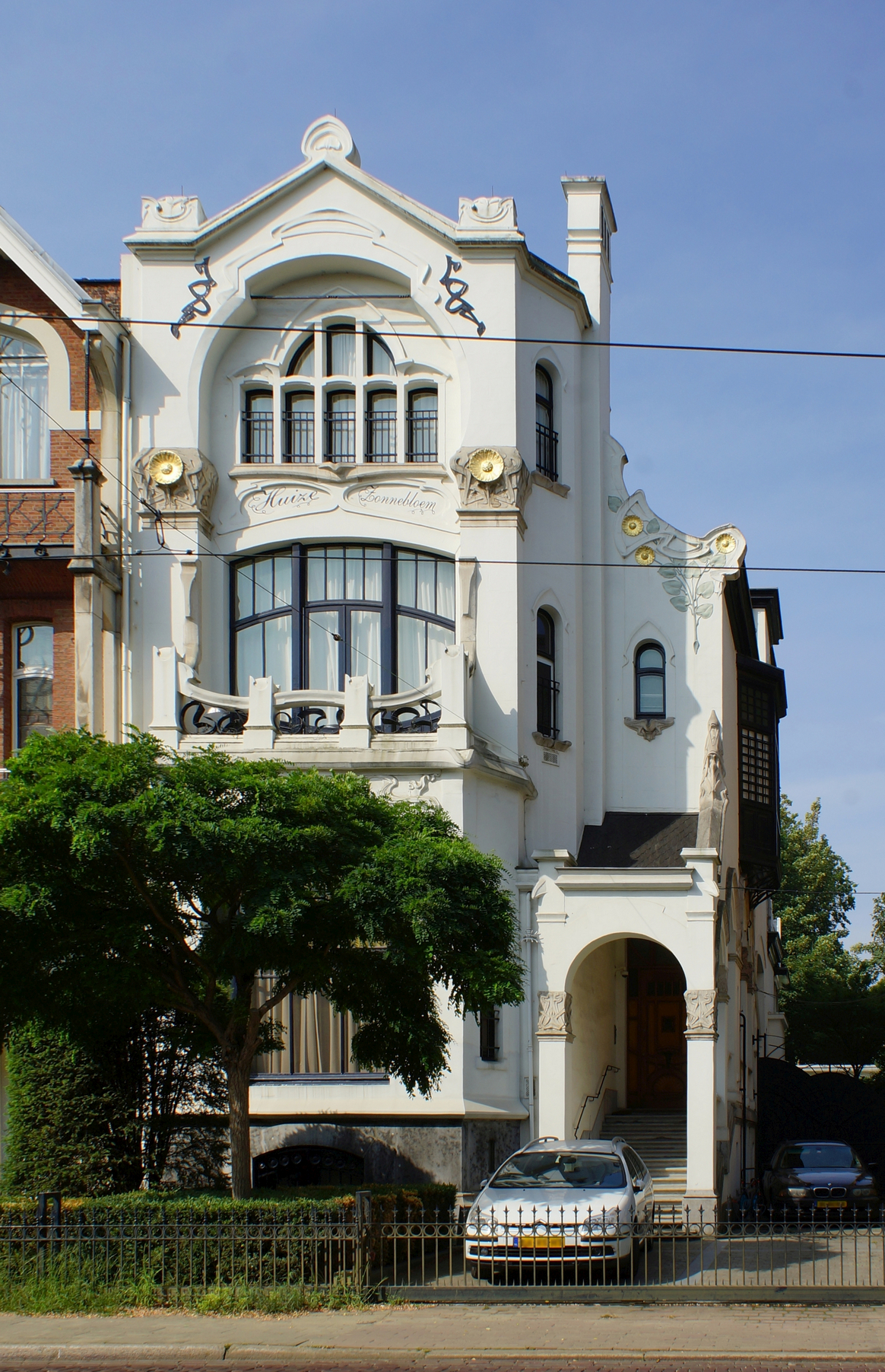 Berchem (Antwerpen), Cogels-Osylei 50. Burgershuis in "Art Nouveau"-stijl "De Zonnebloem", ontworpen door architect Jules Hofman.